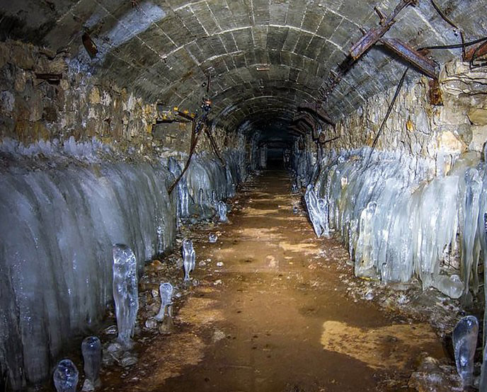 Штольни в горном холодильнике "Красная Глинка"